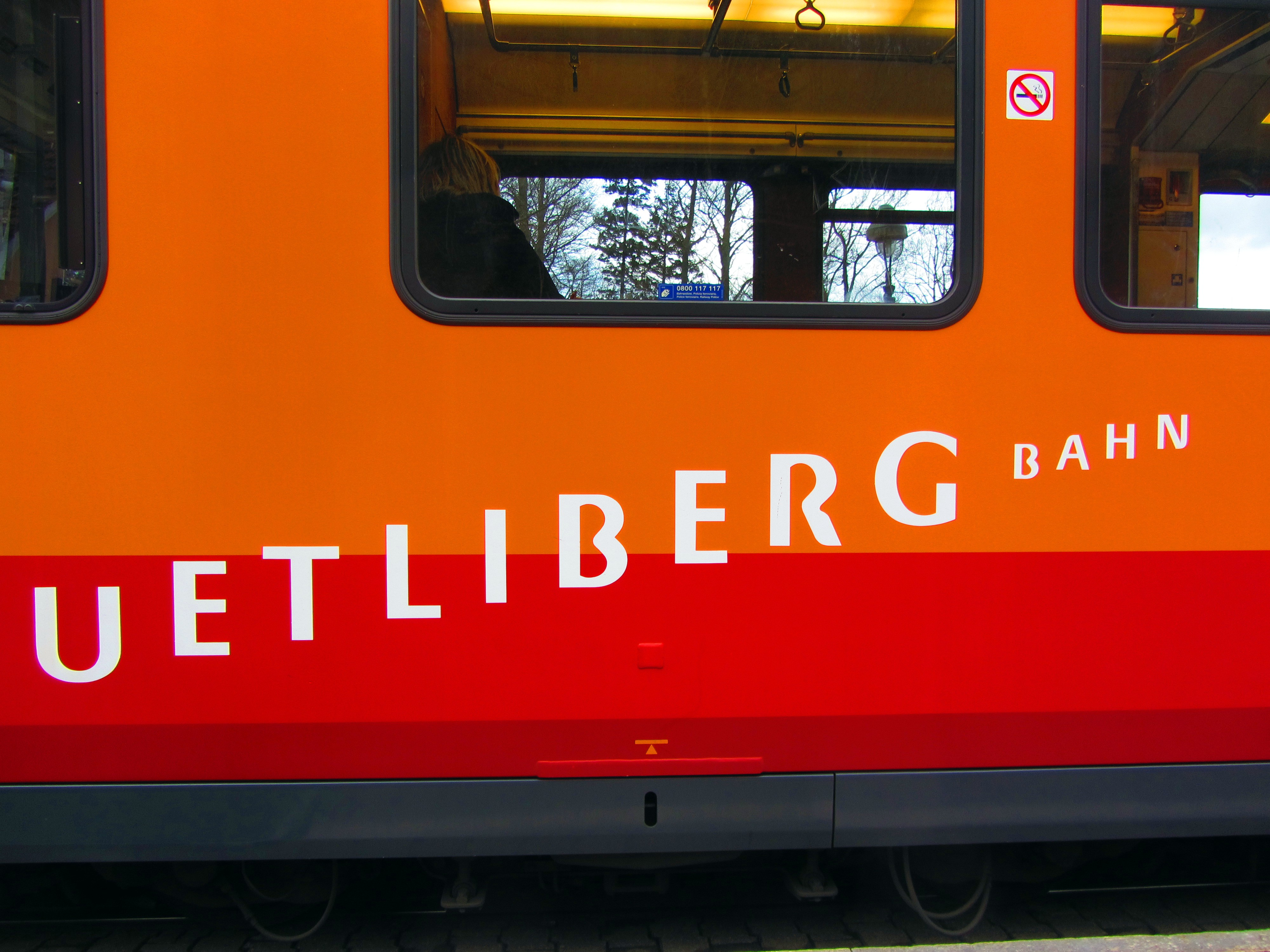 Uetlibergbahn (S-Bahn line S10) at Uetliberg hill station in Switzerland